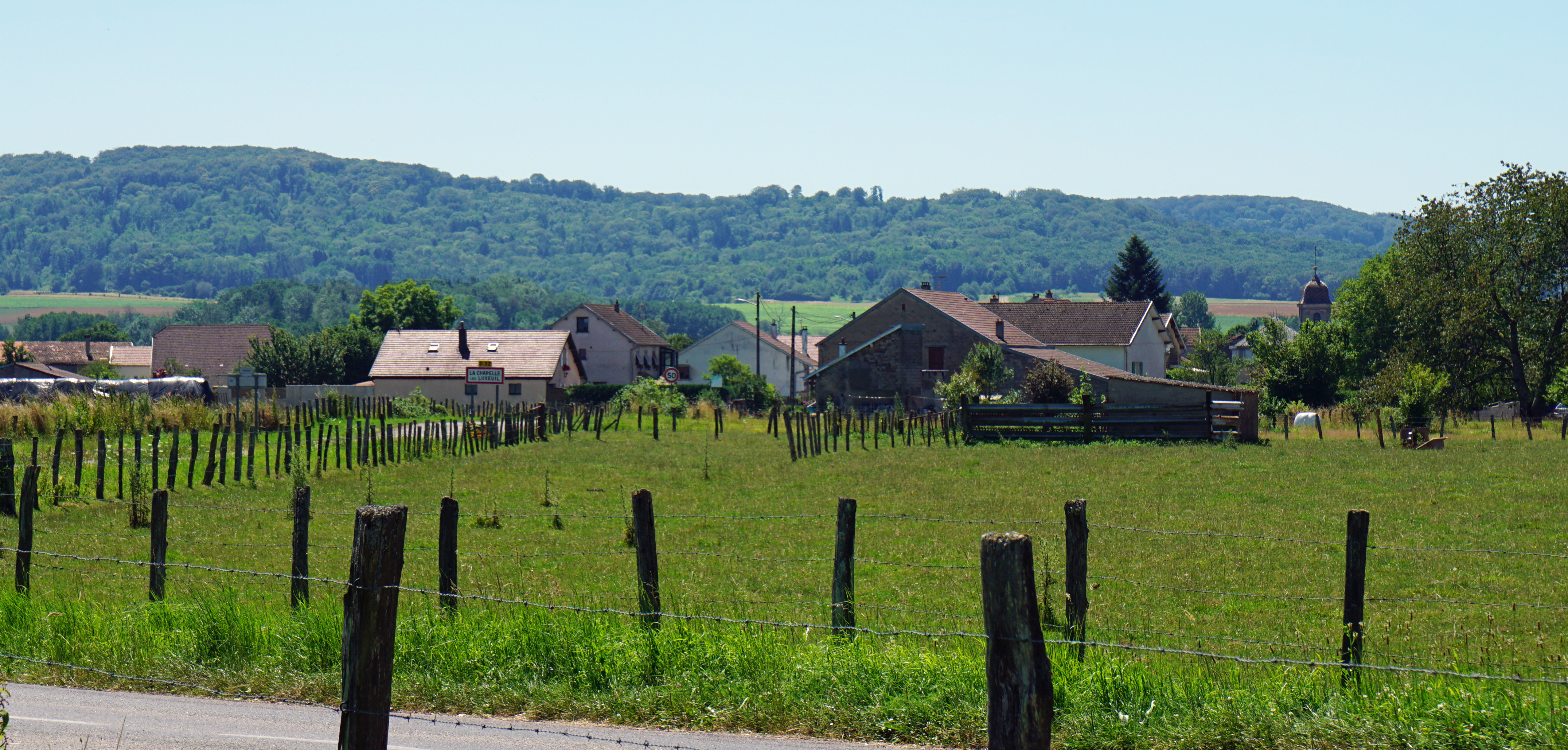 La Chapelle-lès-Luxeuil.